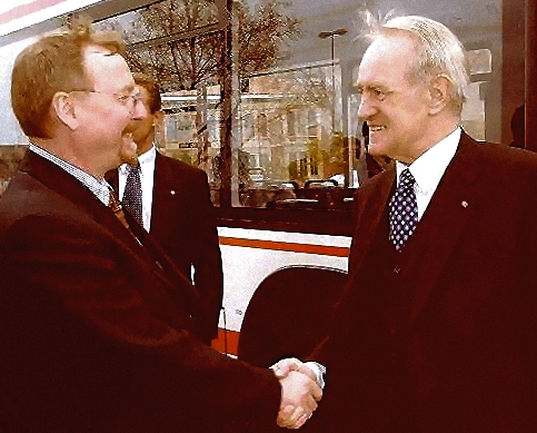 Siegfried Englert and Johannes Rau in Ludwigshafen